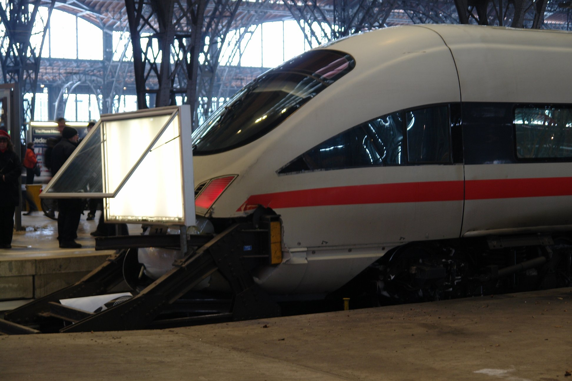 ICE-T im Prellbock des Leipziger Hauptbahnhofes BILD-Bericht